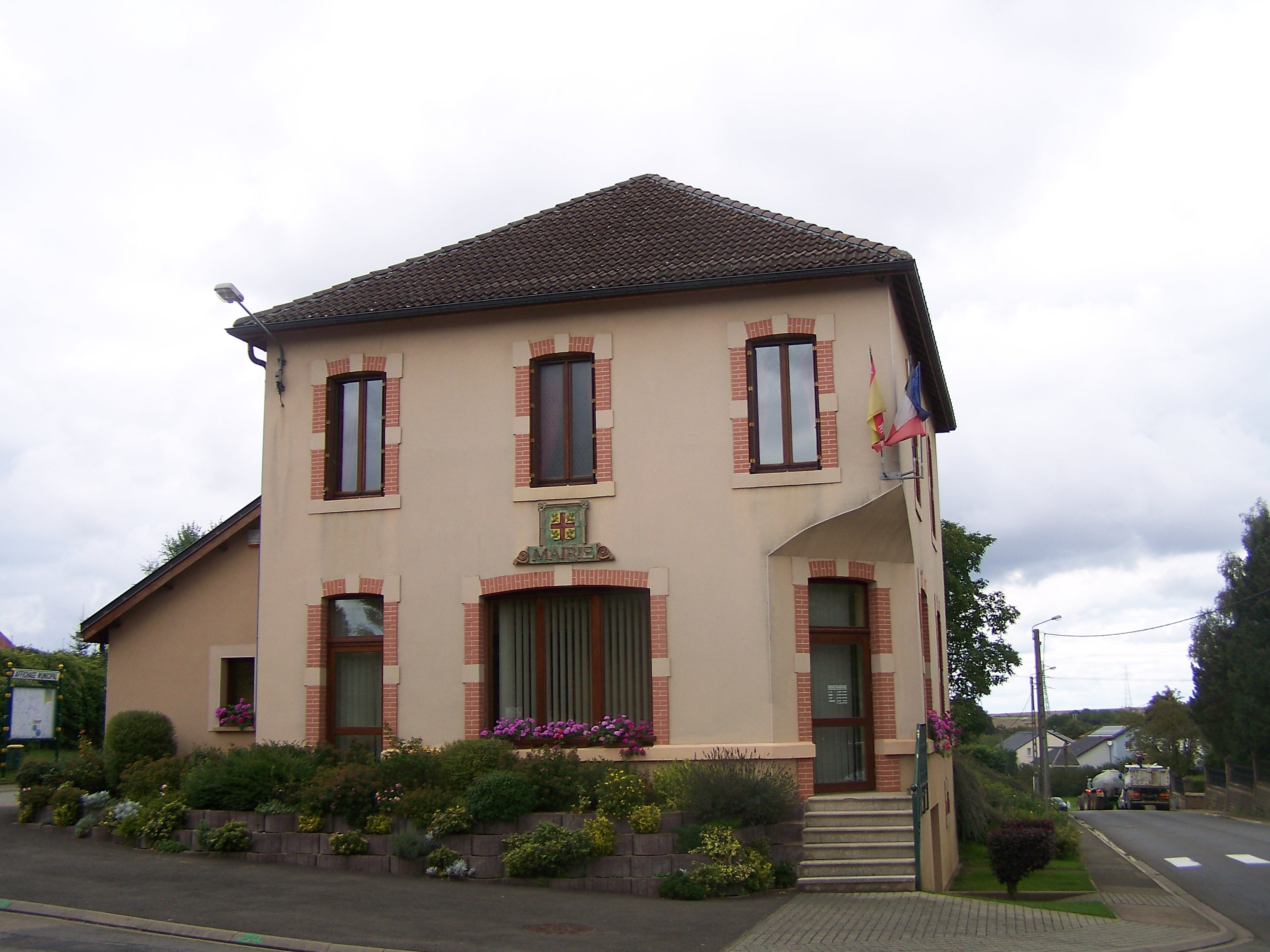 Actuelle mairie de Chénières